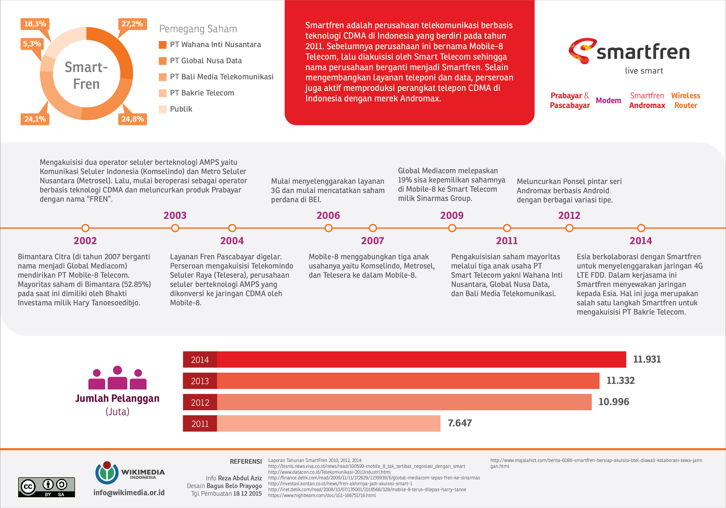 Infografis di atas dibuat sebagai upaya untuk menginformasikan kepada publik mengenai operator telekomunikasi yang beroperasi di Indonesia yaitu SmartFren. Informasi yang dituang dalam infografis berikut ini di antaranya adalah deskripsi singkat perusahaan, produk, pemegang saham, perjalanan usaha, serta jumlah pelanggan.